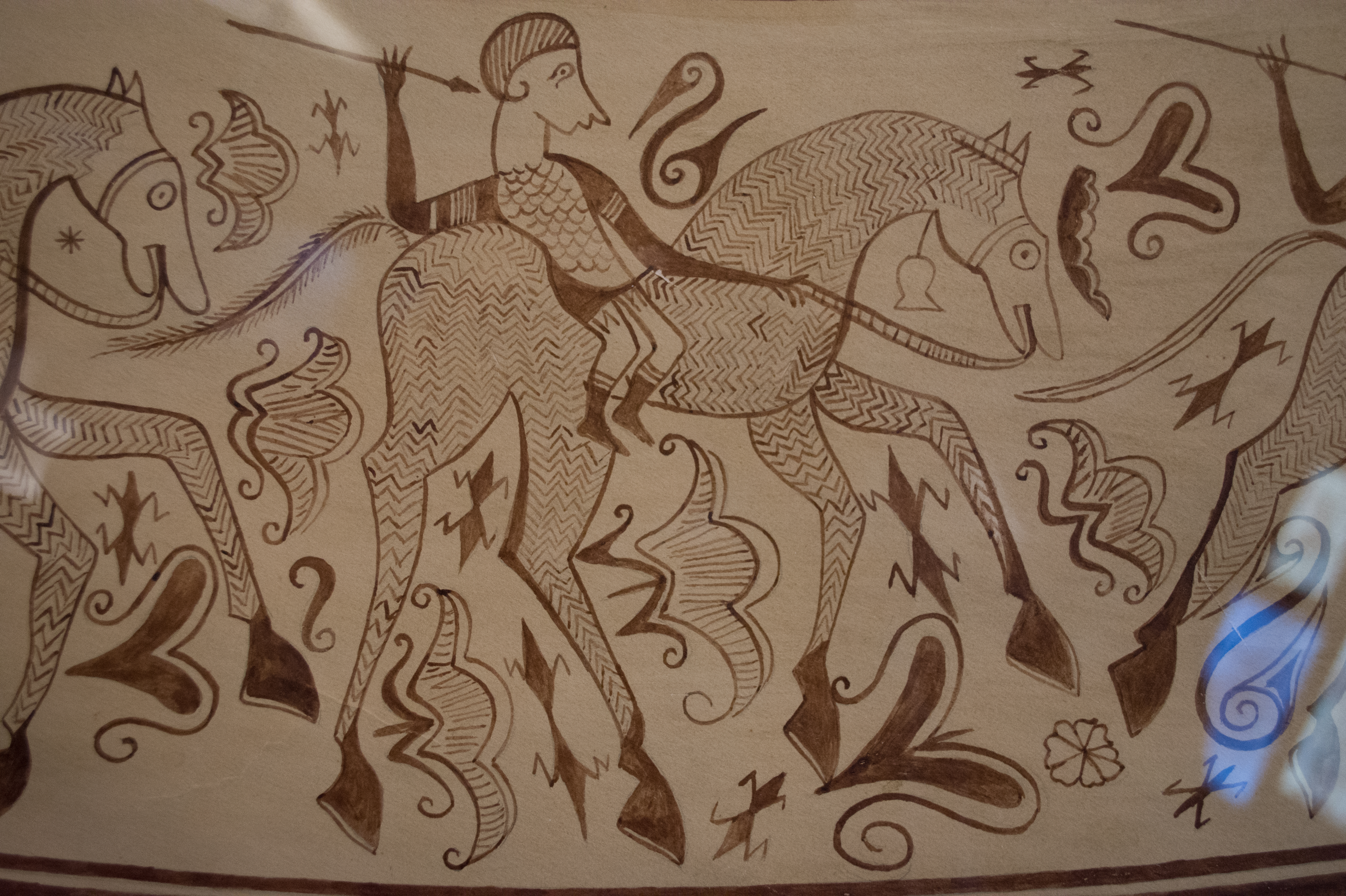 Detalle del Vaso de los Guerreros restaurado en un vinilo (Edeta). Museo de Preshistoria de Valencia.